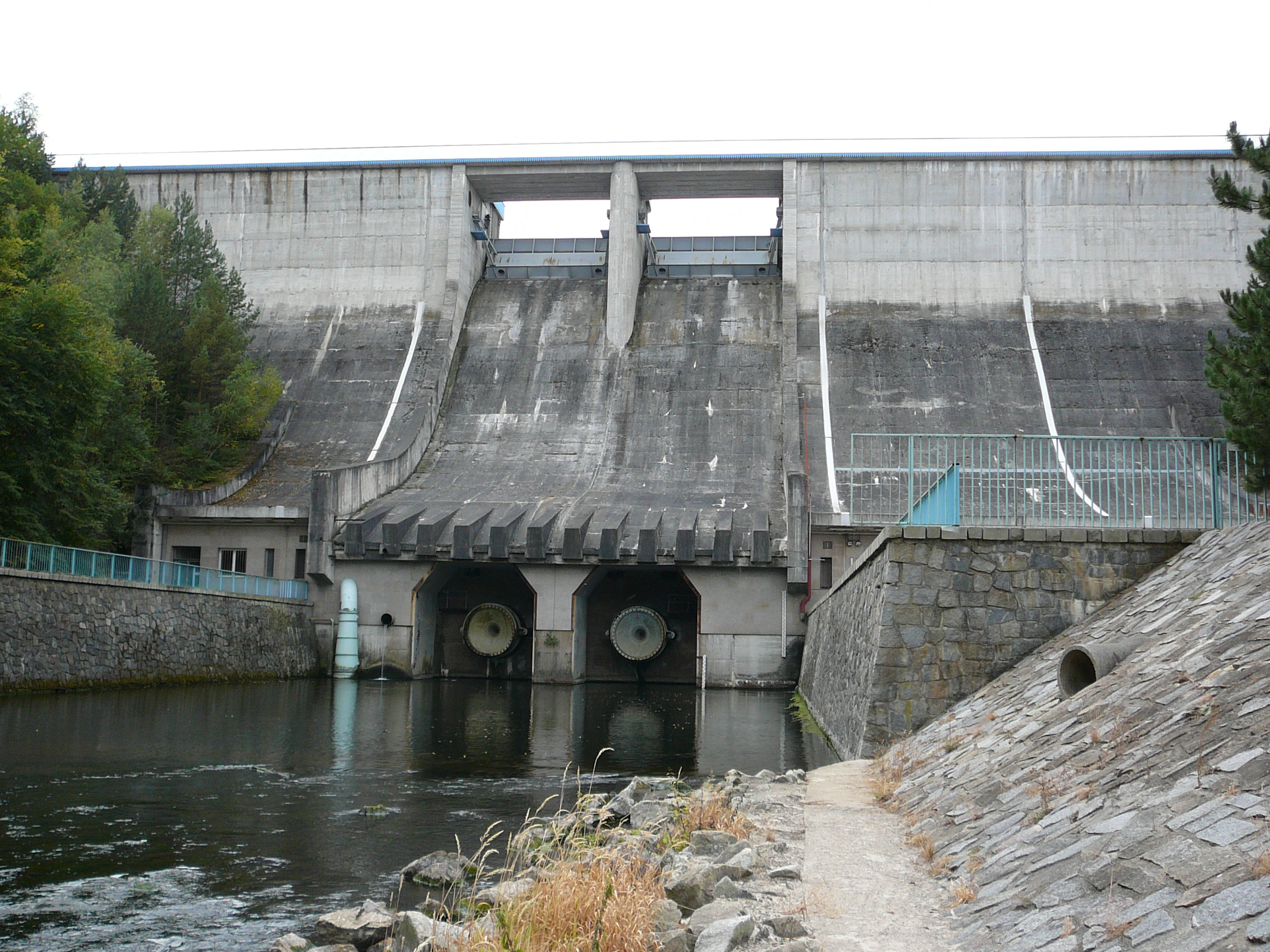 Přehradní těleso Mohelna, fotografovano pod hrází cca 2 m nad hladinou řeky